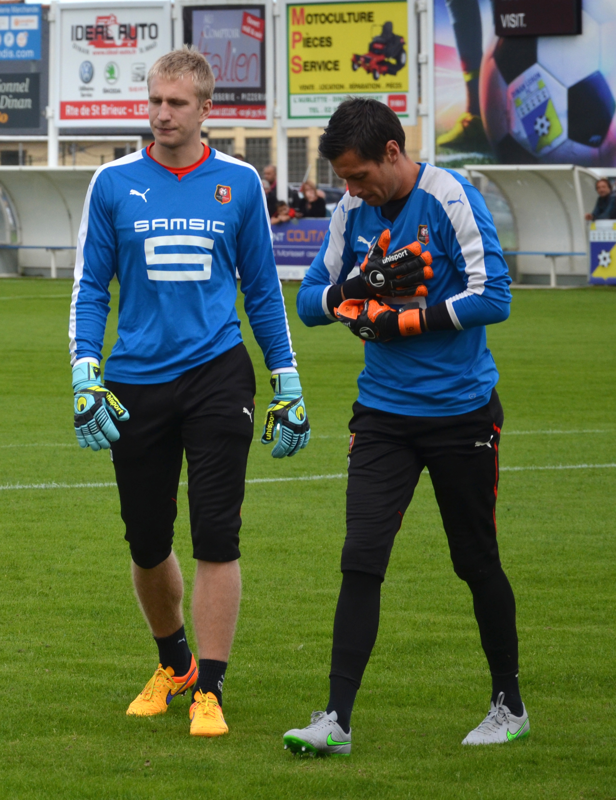 Photographie prise lors d'un entraînement du Stade rennais délocalisé à Dinan. Ici, Edvinas Gertmonas et Olivier Sorin.